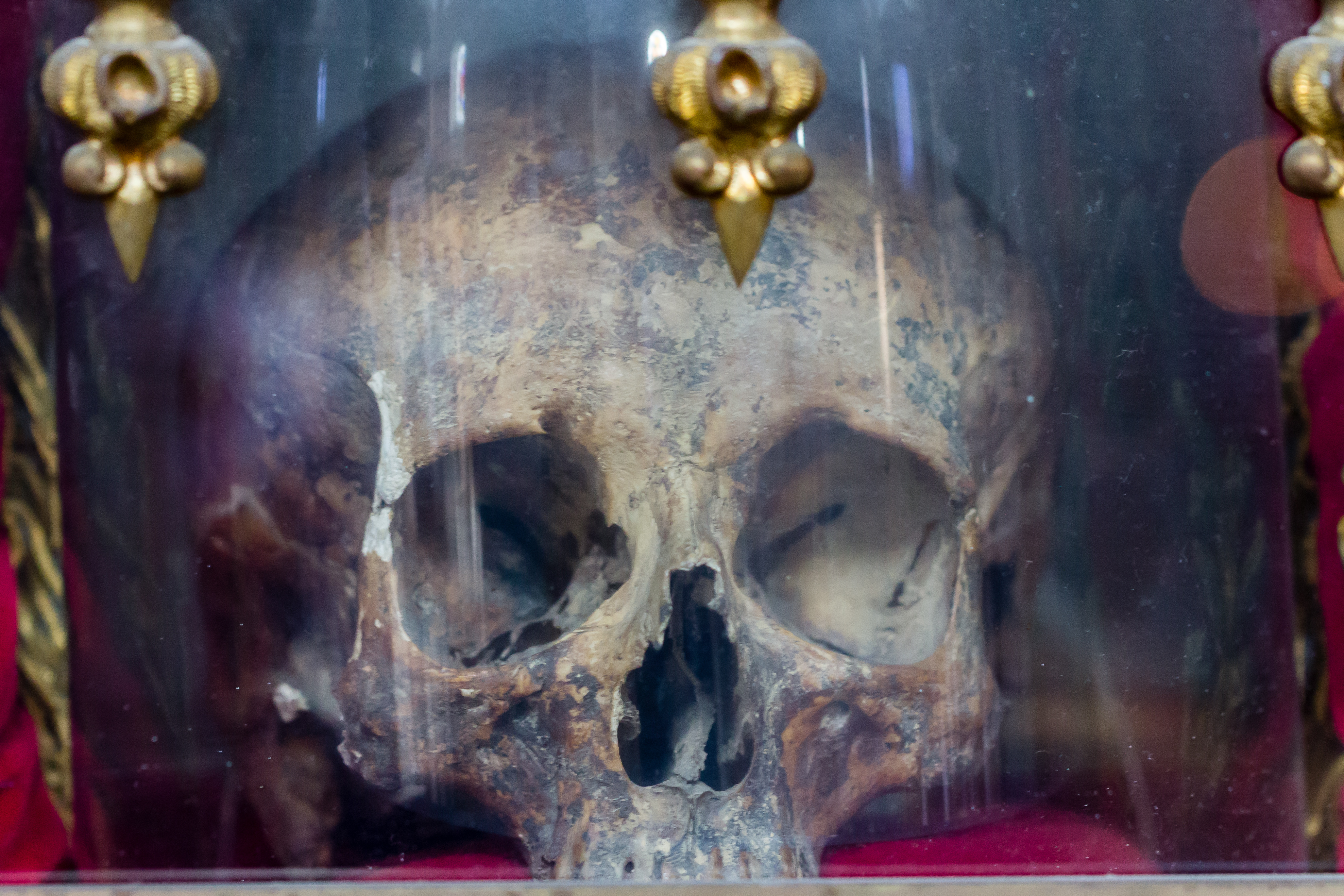 Crâne de saint Guillaume Firmat, conservé dans la Collégiale Saint-Évroult de Mortain (France).